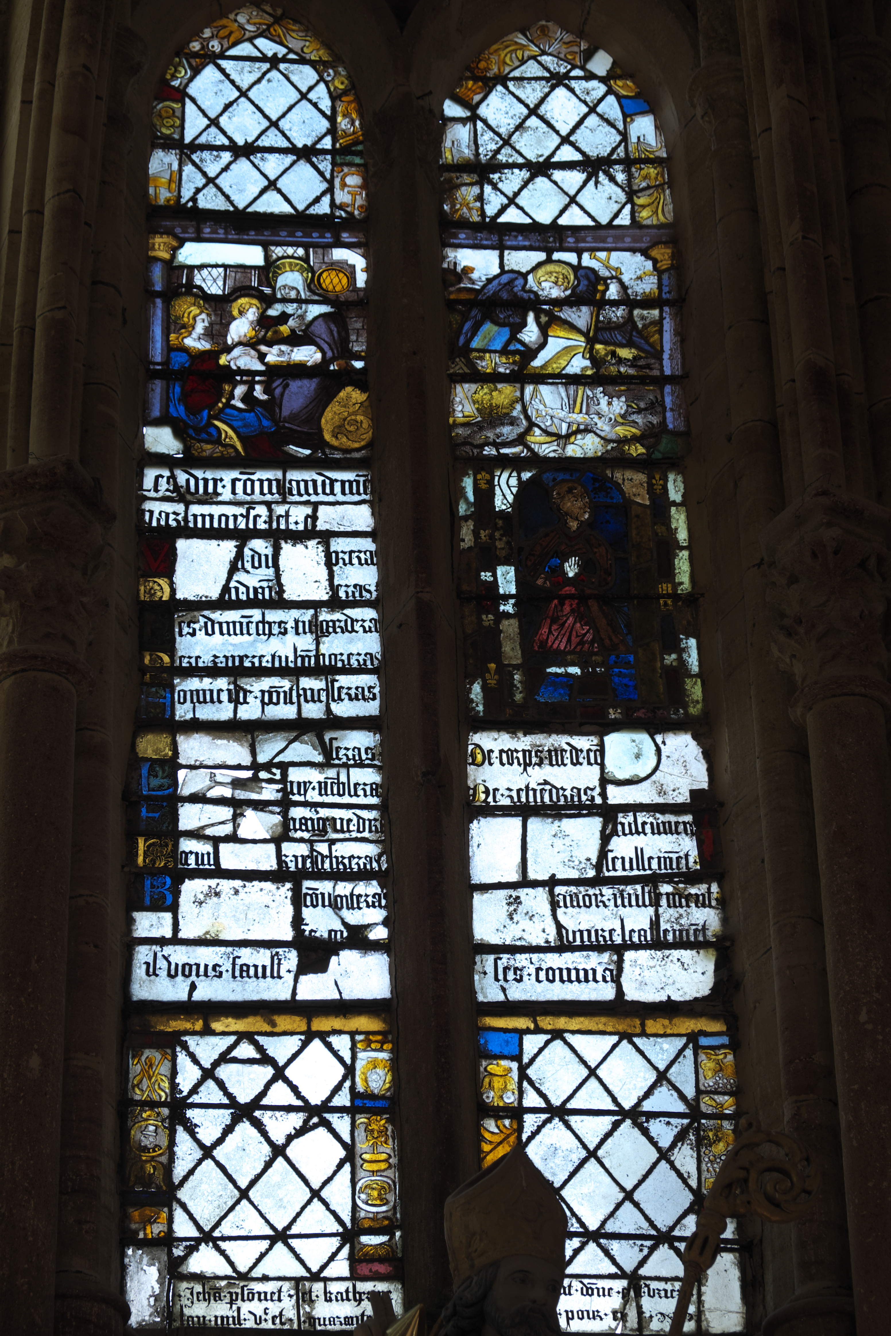 Katholische Pfarrkirche Saint-Amand in Saint-Amand-sur-Fion im Département Marne in der Region Grand Est/Frankreich, Bleiglasfenster mit Fragmenten aus dem 13. und 16. Jahrhundert